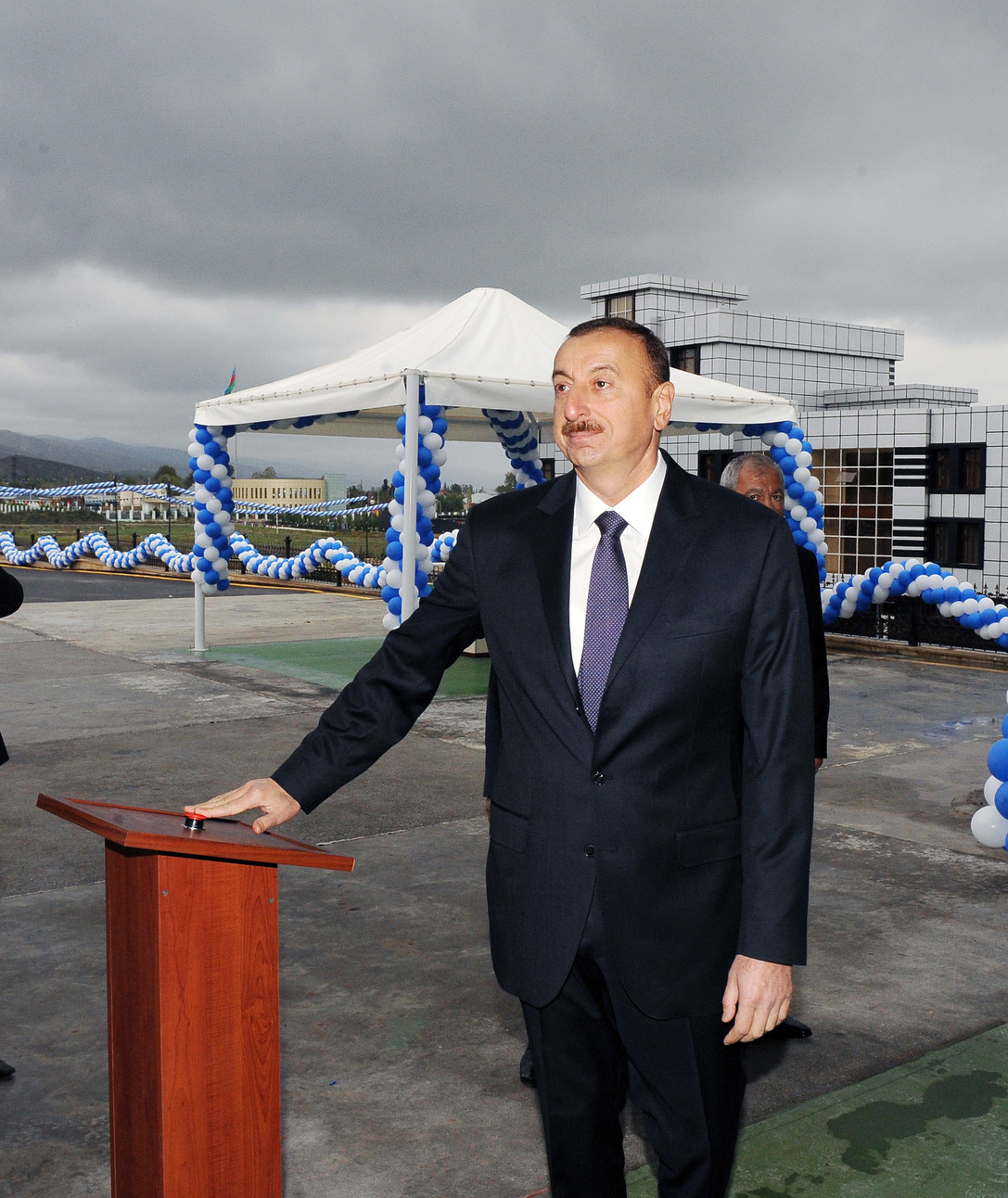 İlham Əliyev Ağsuda “Az-Granata” MMC-nin şirə və şərab emalı zavodunun açılışında